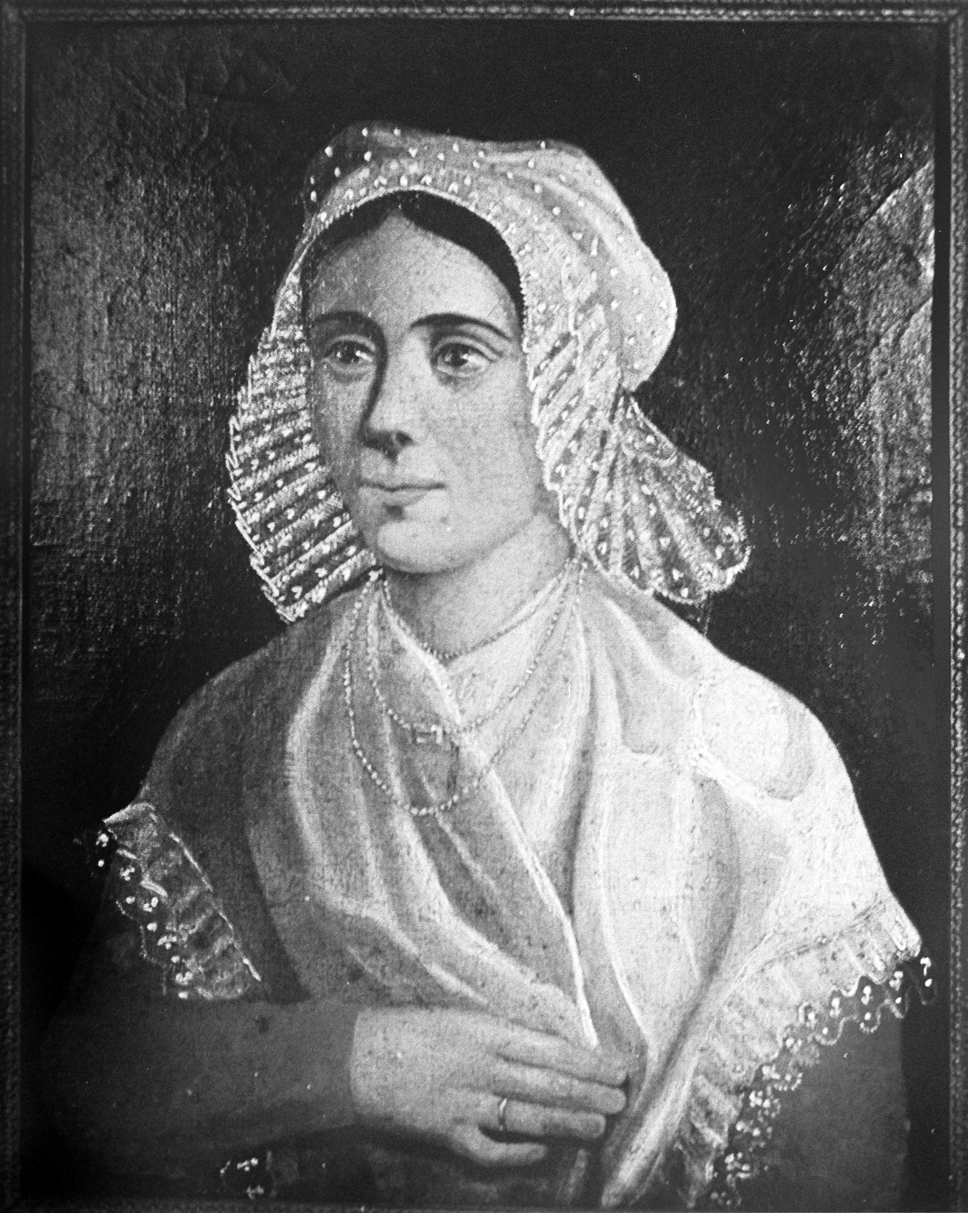 portrait de la bouchere de mauperthuis